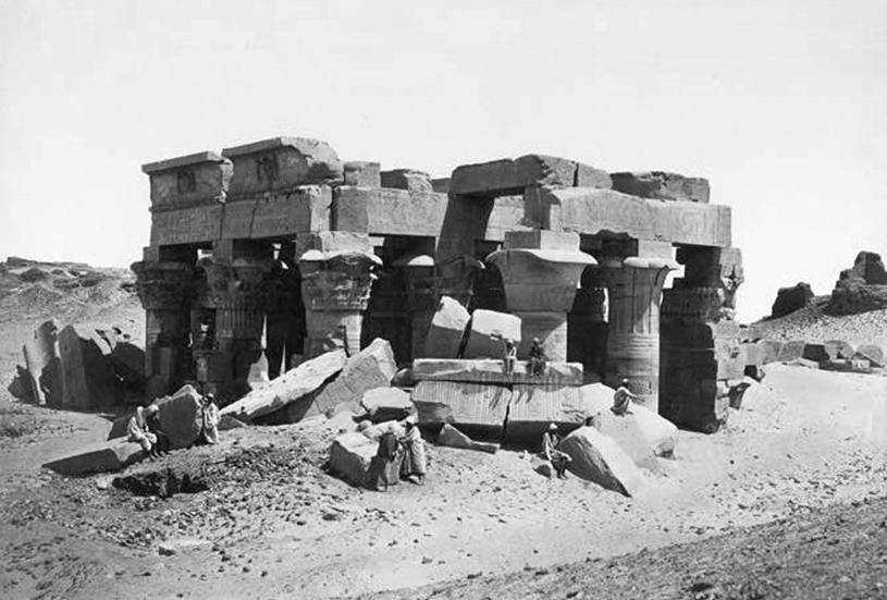 Templo de Kom Ombo, no século XIX.